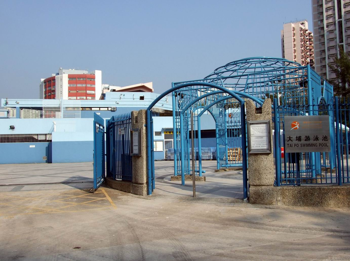 大埔游泳池入口